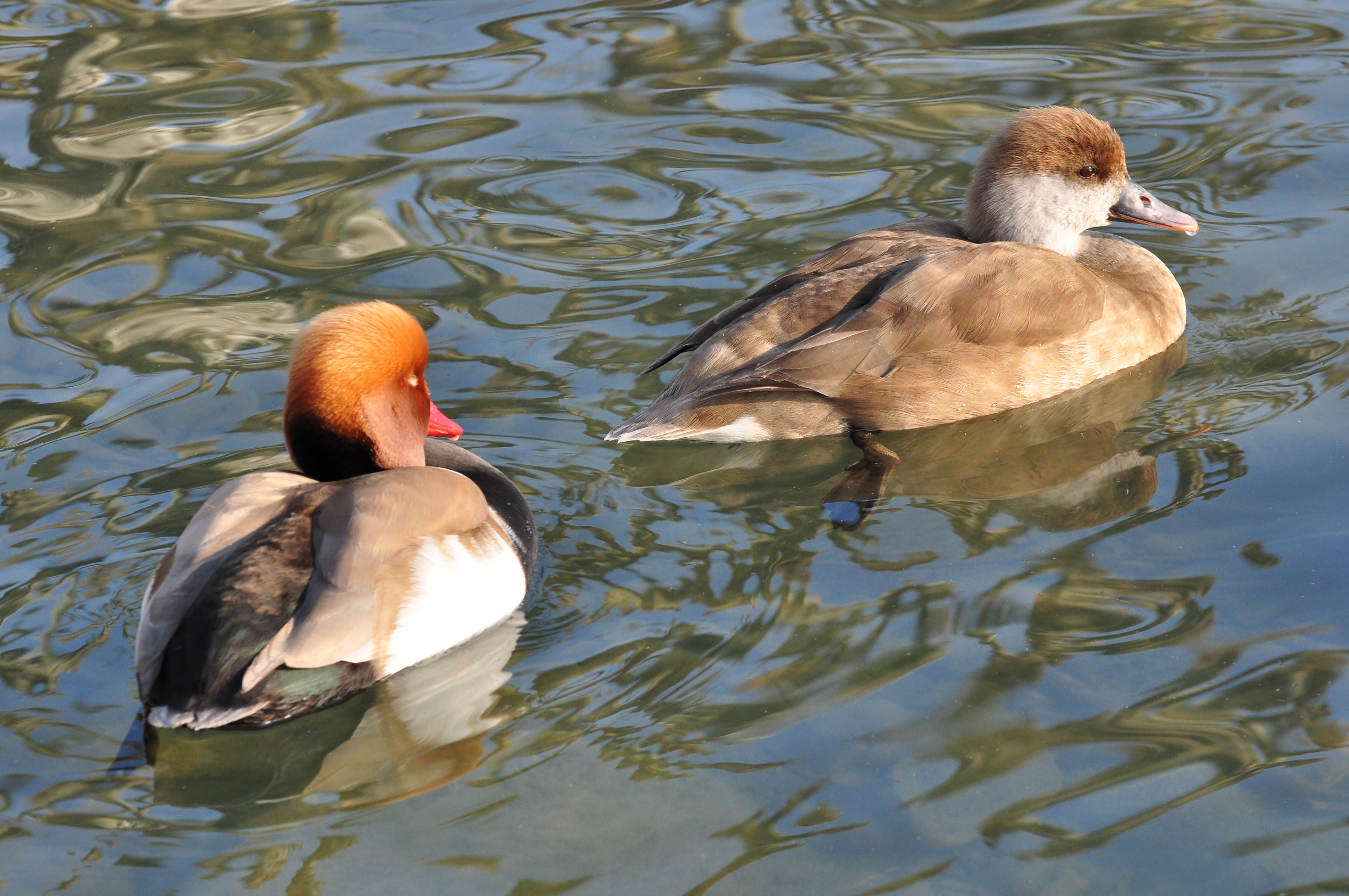 Netta rufina, Hafen in Rapperswil (Switzerland)